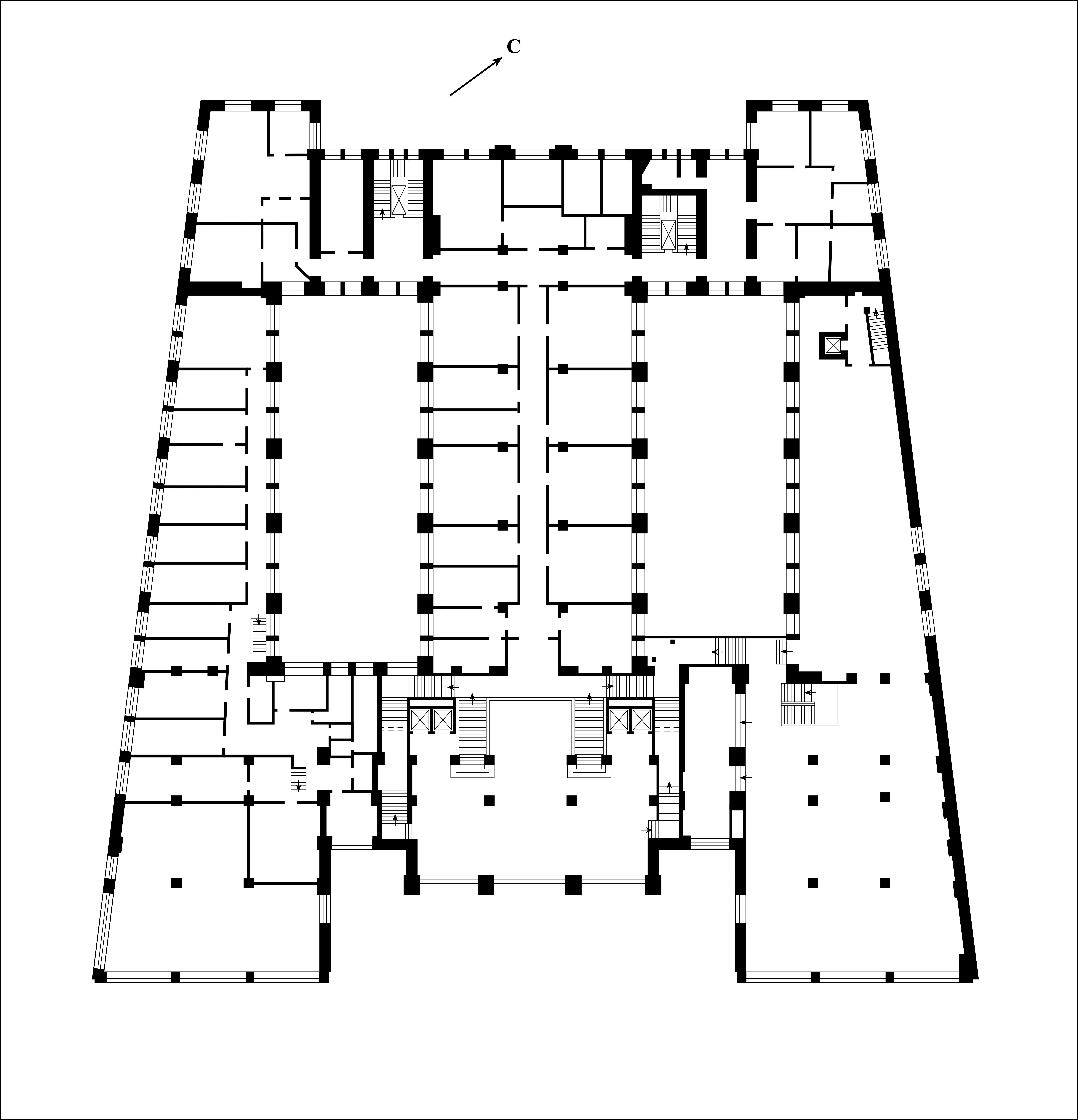 Здание Госторга на Мясницкой улие в Москве. План 2-го этажа